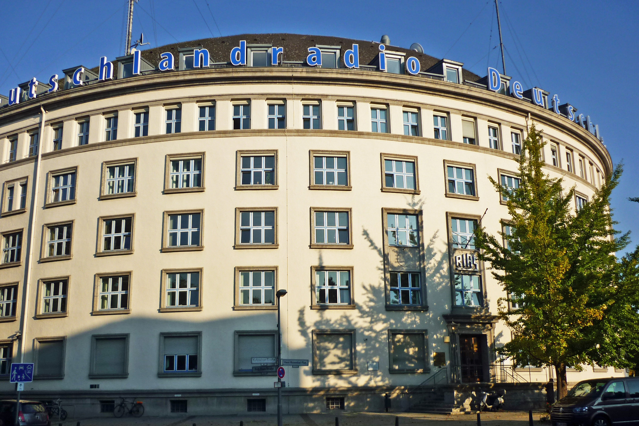 Ehemaliges RIAS-Funkhaus am Hans-Rosenthal-Platz in Berlin-Schöneberg